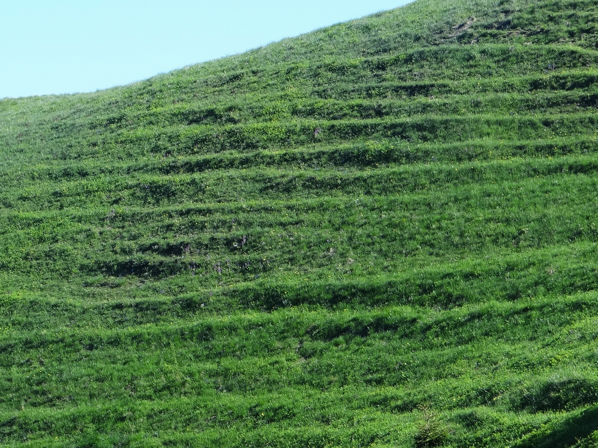 Ploská